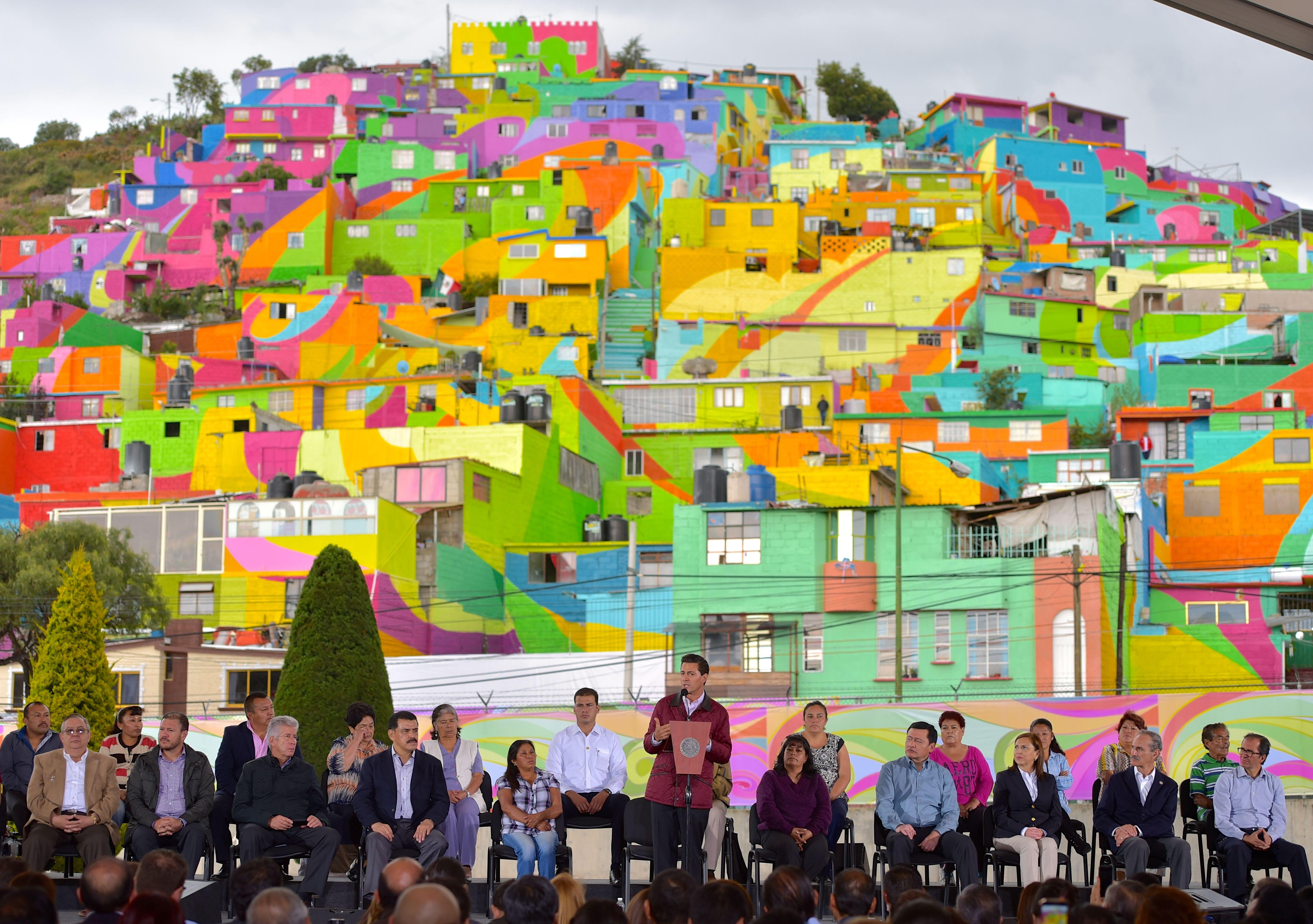 Inauguración del Macromural “Pachuca se Pinta”. Pachuca, Hidalgo. 31 de agosto de 2015.